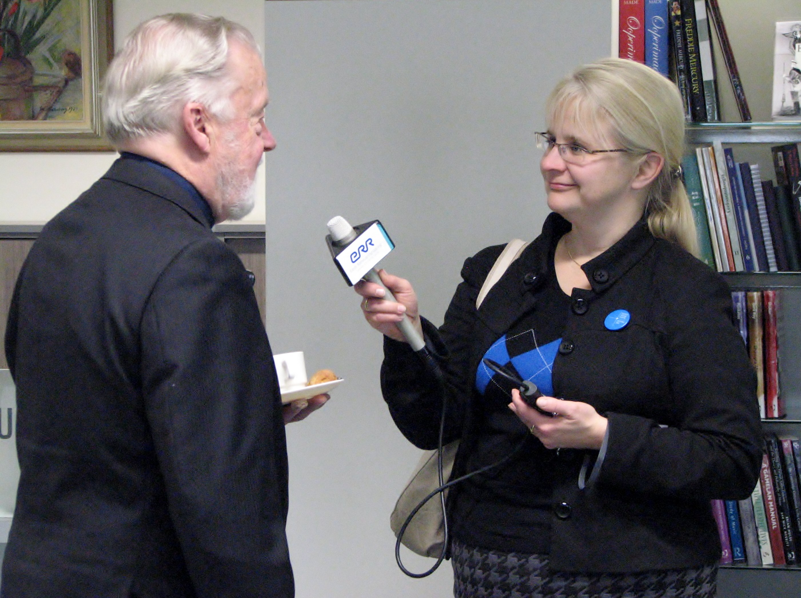 Kai Vare Rahvusraamatukogu Eesti üldlaulupidude nootide digitaalkogu esitlusel intervjueerimas Vello Salot